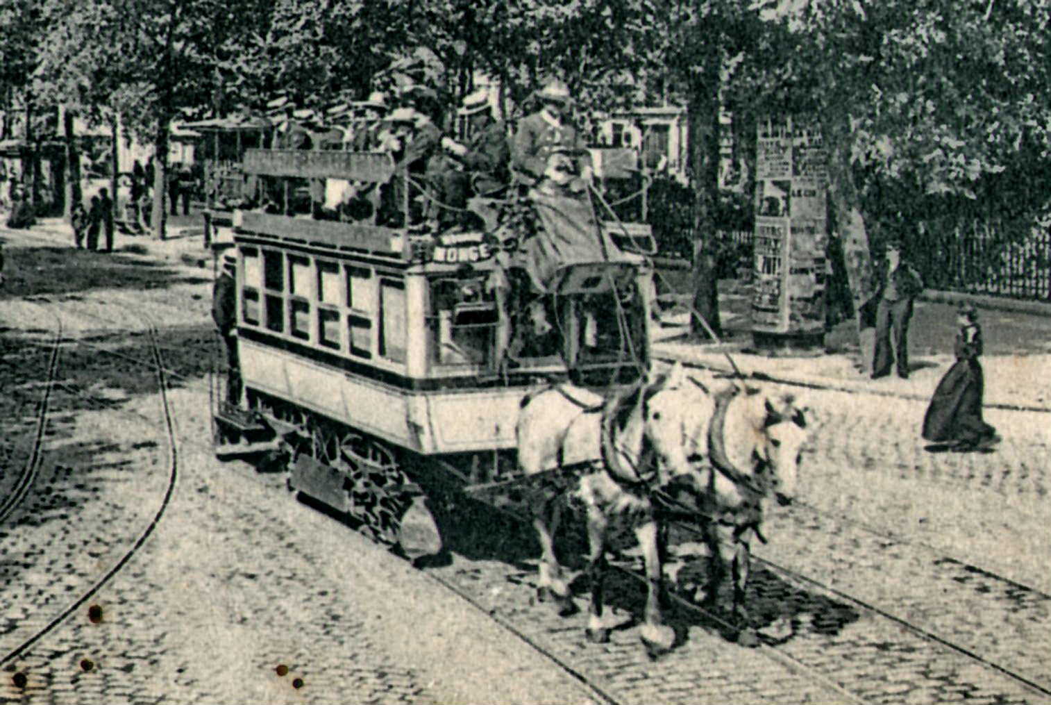 Détail d'une carte postale ancienne éditée par ELD, N°69PARIS : Boulevard de SébastopolDétail de la carte sur le tramway hippomobile de la CGO ligne de la Chapelle au square Monge